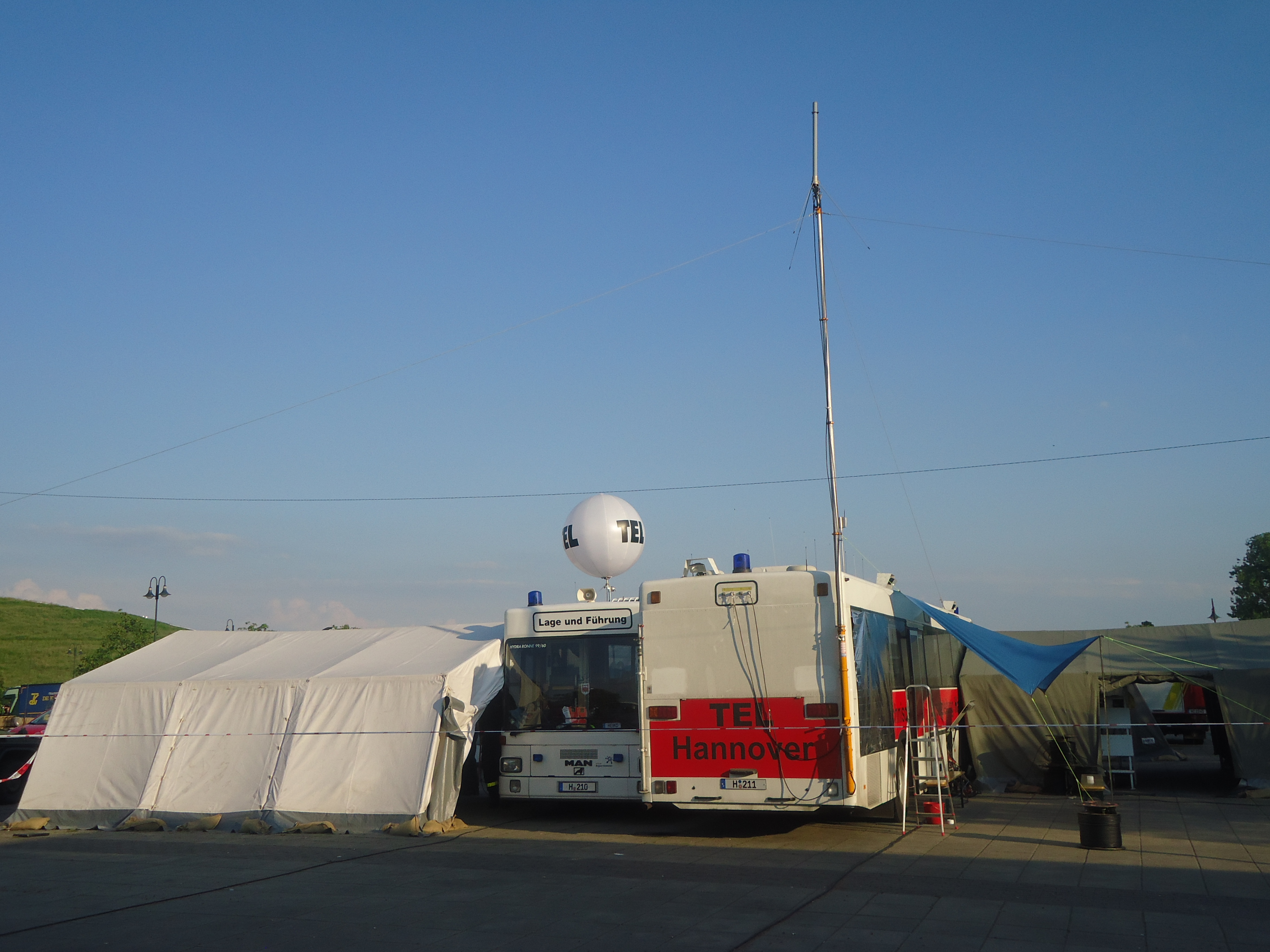 Technische Einsatzleitung der Region Hannover. Im Hochwassereinsatz Magdeburg 2013